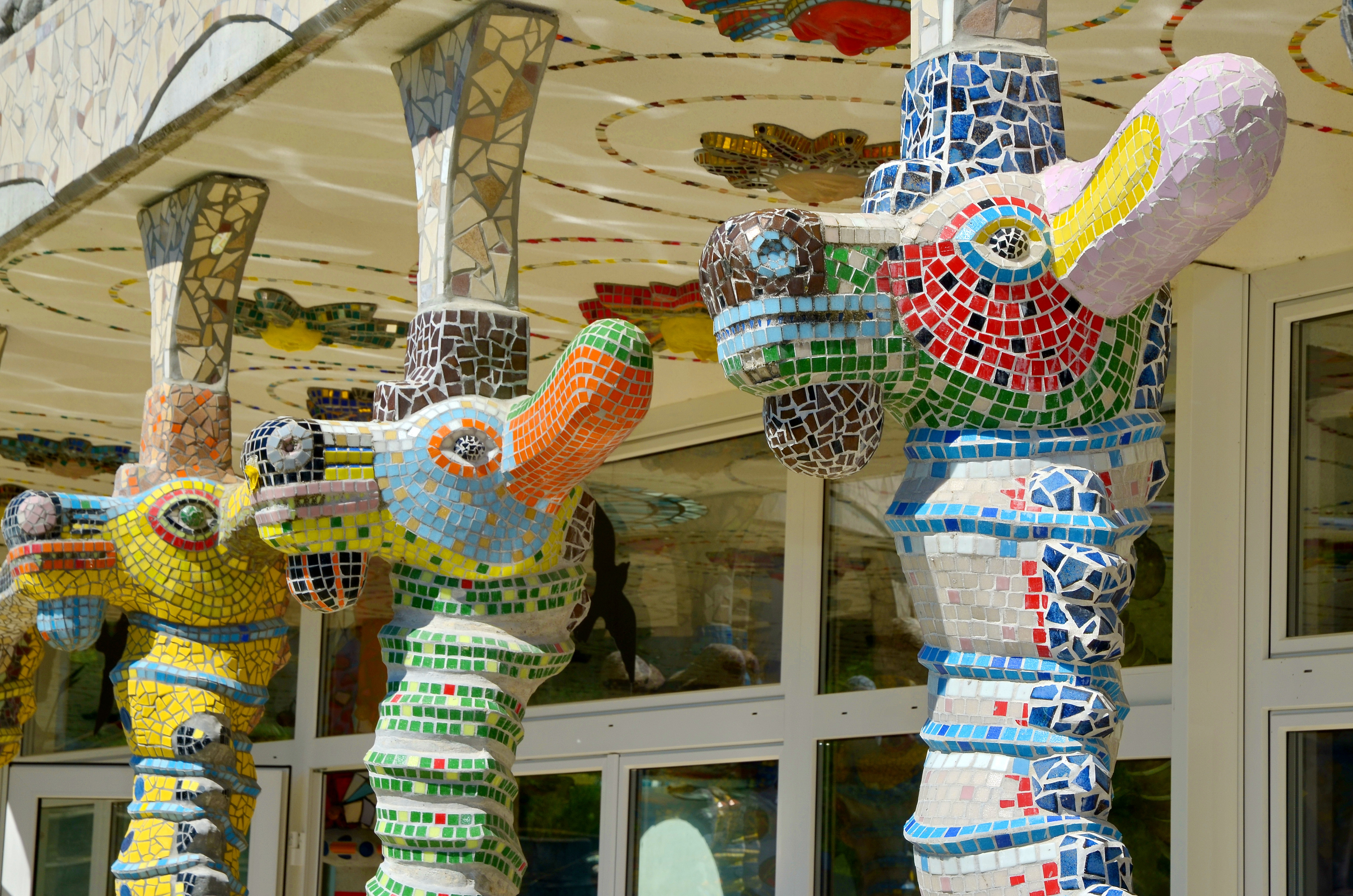 Bruno Weber Skulpturenpark in Dietikon - Spreitenbach (Switzerland)